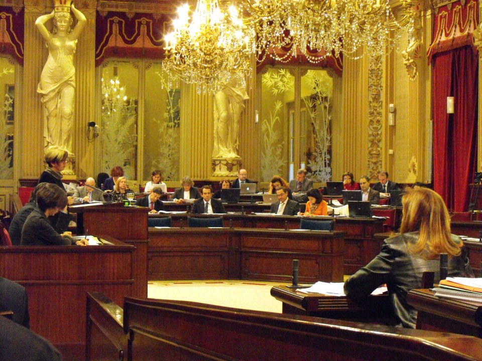 Sala de plens del Parlament de les Illes Balears